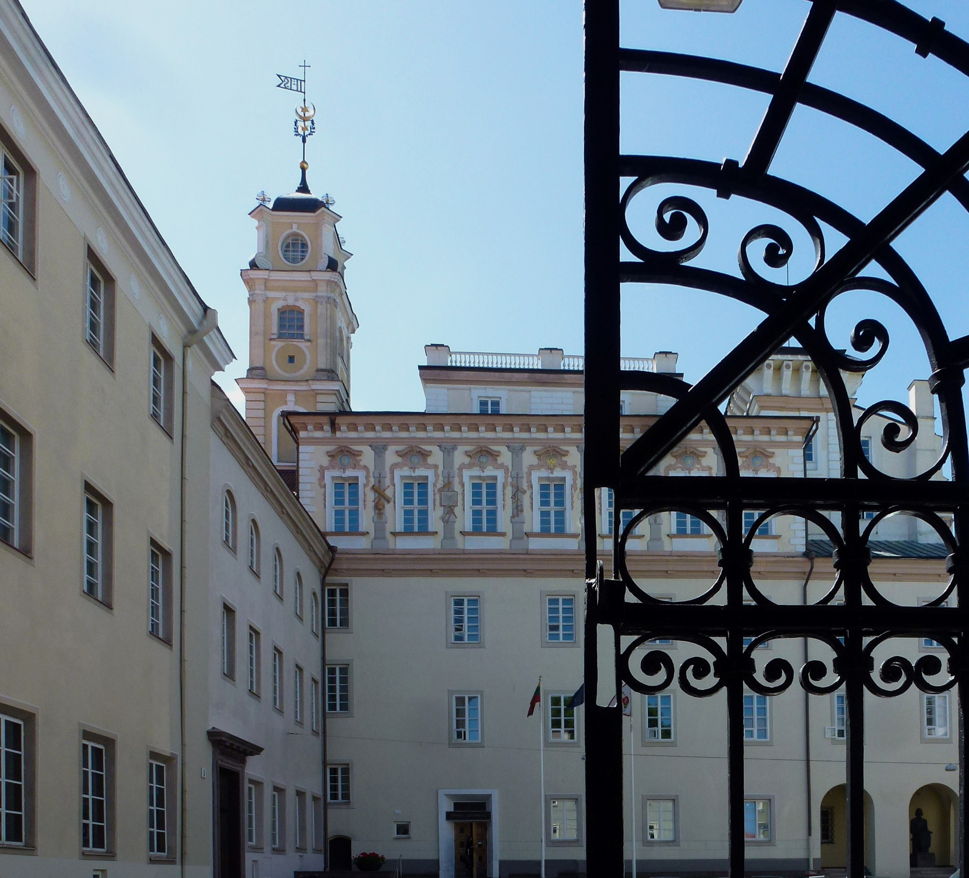 L'Université de Vilnius, Vilnius.- Lituanie